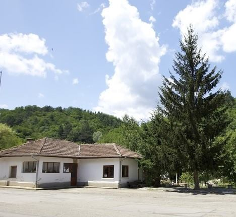 Кметство